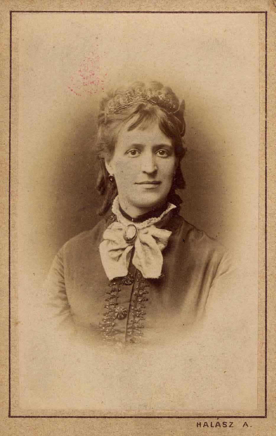 Toperczer Ilka (1847-1876) magyar szoprán operaénekes kb. 25-28 éves korában. Hungarian Theatre Museum and Institute LocationBudapestCoordinates47° 29′ 52″ N, 19° 01′ 46.07″ E Established1952Website